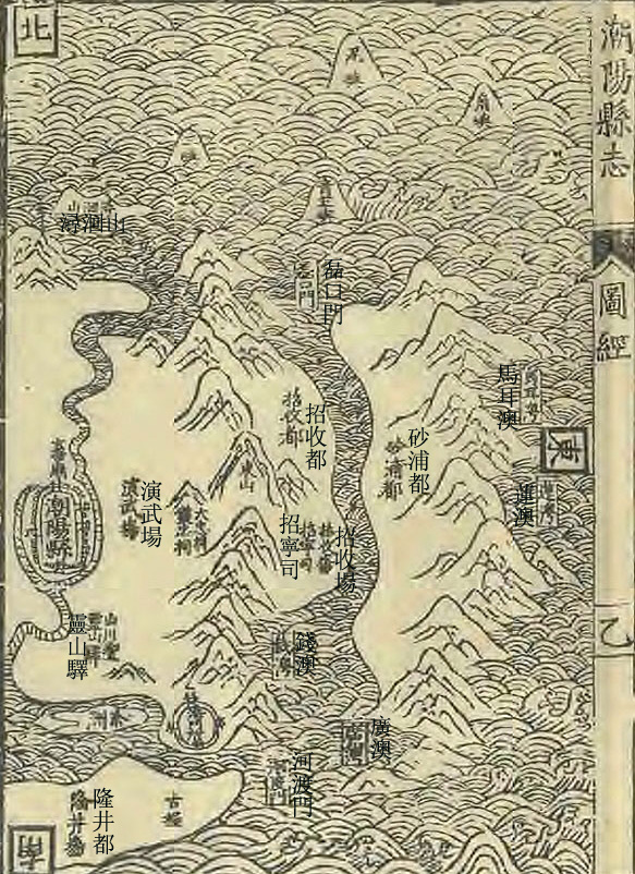 明隆庆六年（1572年）《潮阳县志》《图经》招收都、砂浦都